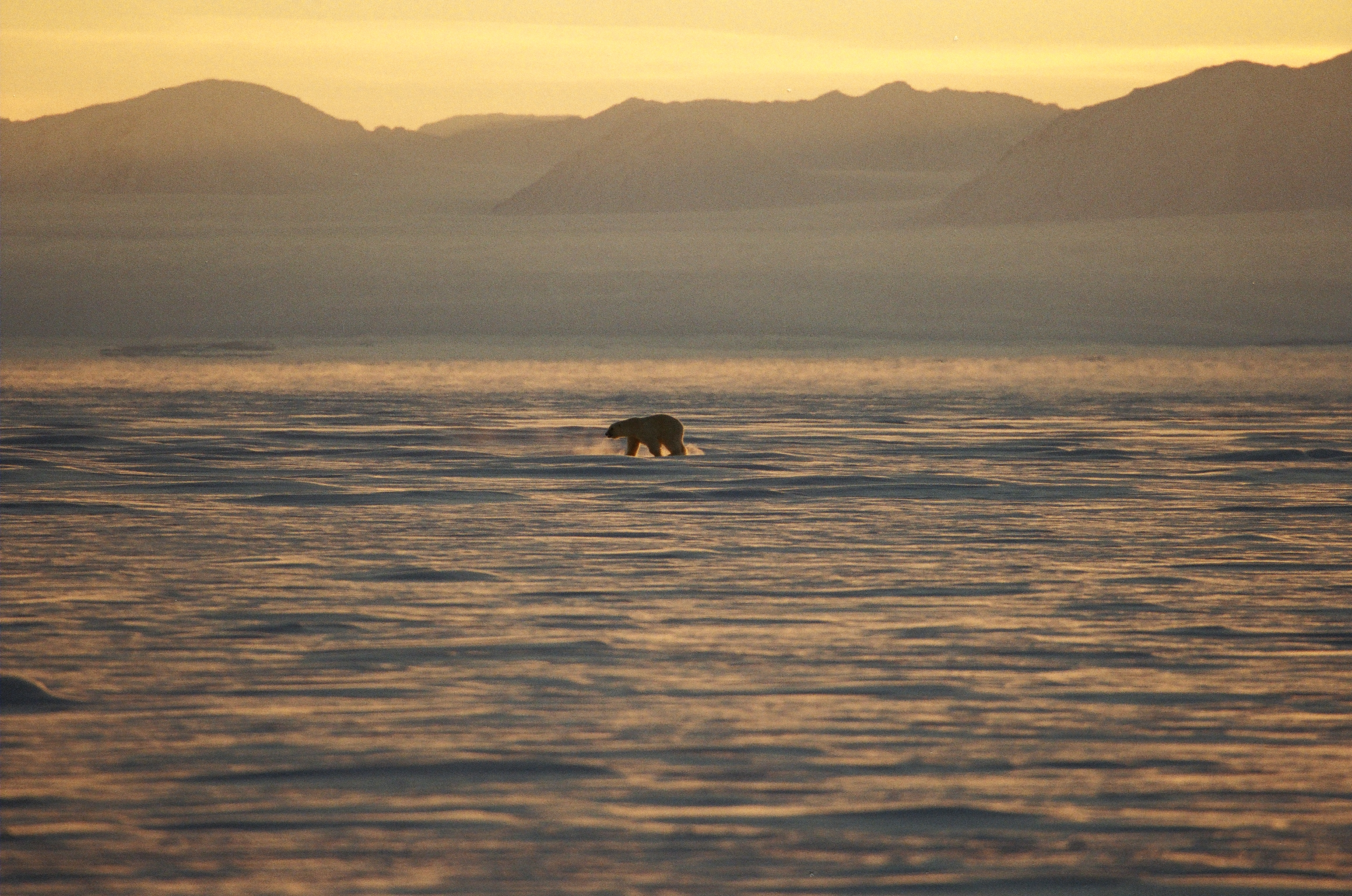 Dette er en isbjørn på Grønland, Østkysten. Tatt kanskje for et år siden eller to. Tatt av meg selv.